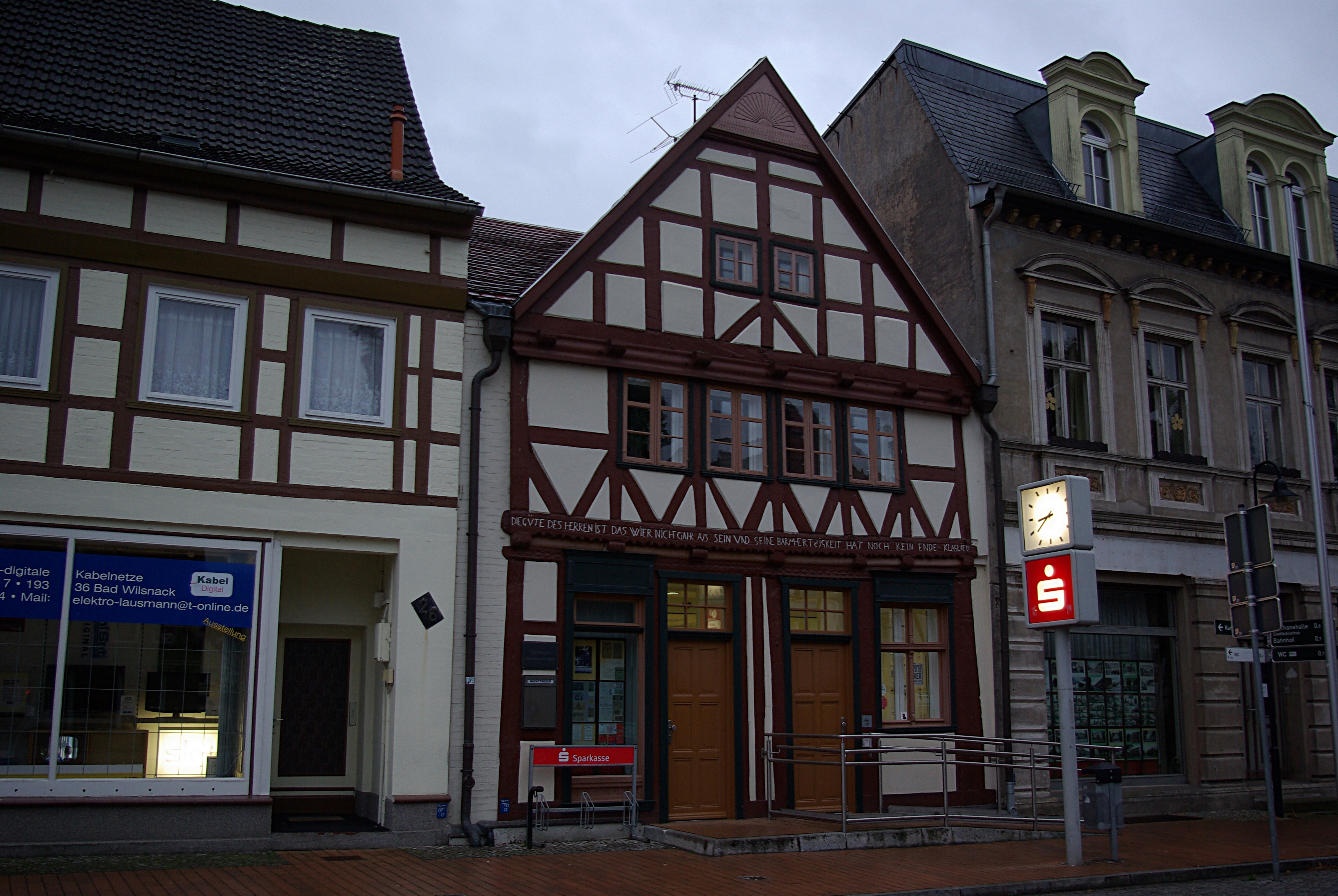 Bad Wilsnack in Brandenburg. Das Haus in der Großen Straße 27 steht unter Denkmalschutz. Es befindet sich in der Nähe des Rathauses.